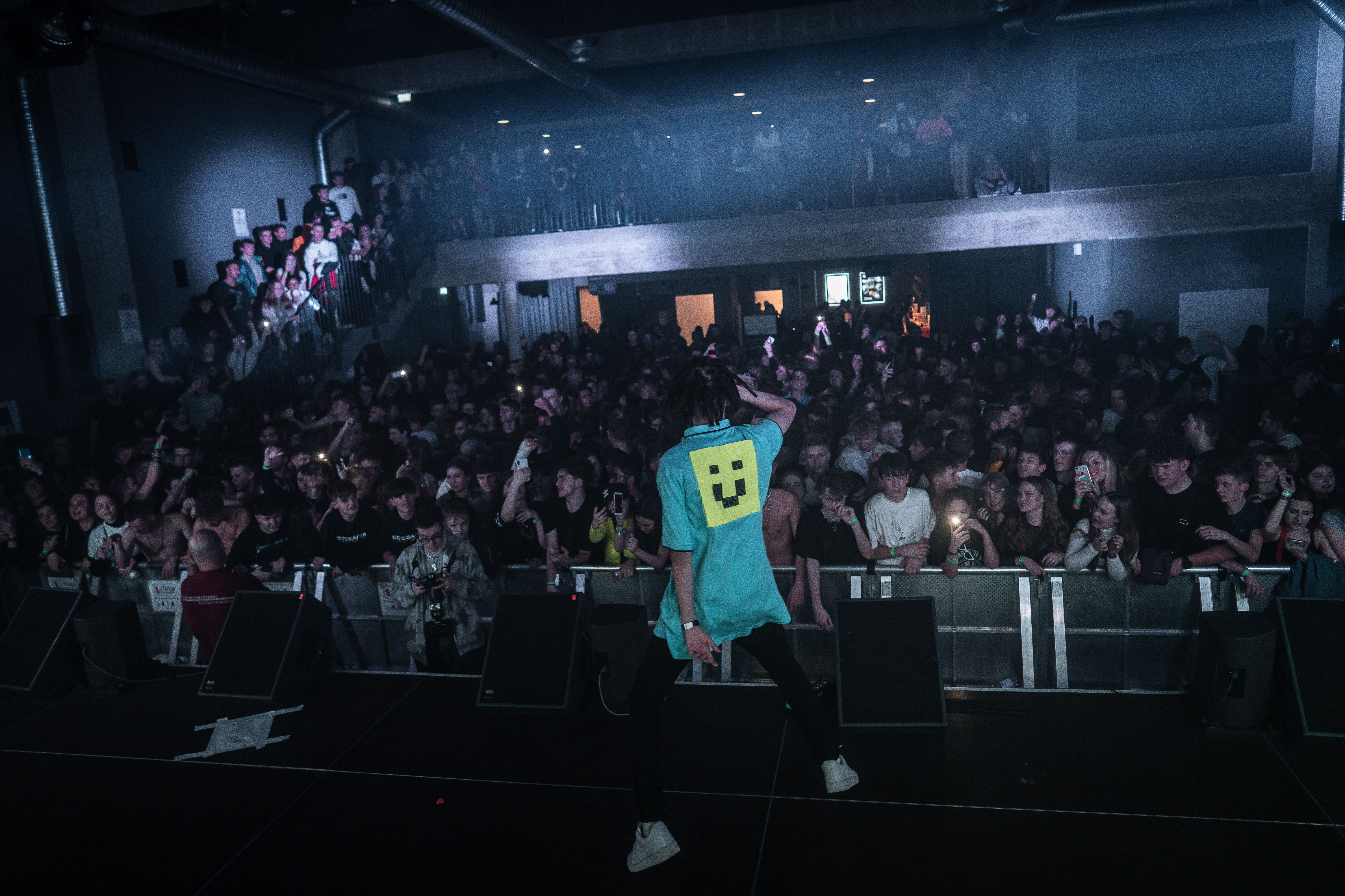 Negatiiv OG bei einem Konzert